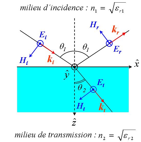 Schéma représentant la réflexion-transmission d'une onde plane électromagnétique lors d'un changement de milieu. Polarisation du champ électrique transverse au plan d'incidence. Hypothèses sur les milieux : linéaires, homogènes et isotropes.